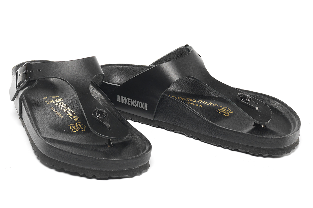 Modèle GIZEH (Entre-doigt) en Cuir Noir avec la semelle intérieure Exquisite (fine peau de cuir ton sur ton).